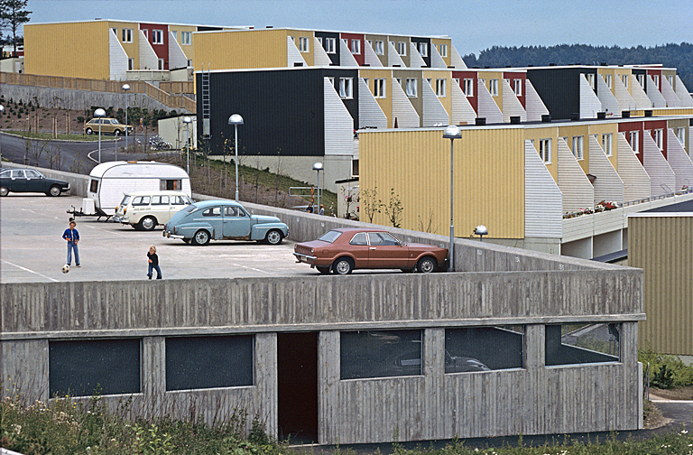 Parkeringsplats, radhusområde i bakgrunden. Motiv: Lövgärdet Nyckelord: Riksintressen Kategori: Stadsmiljö Parkeringsplats, radhusområde i bakgrunden.